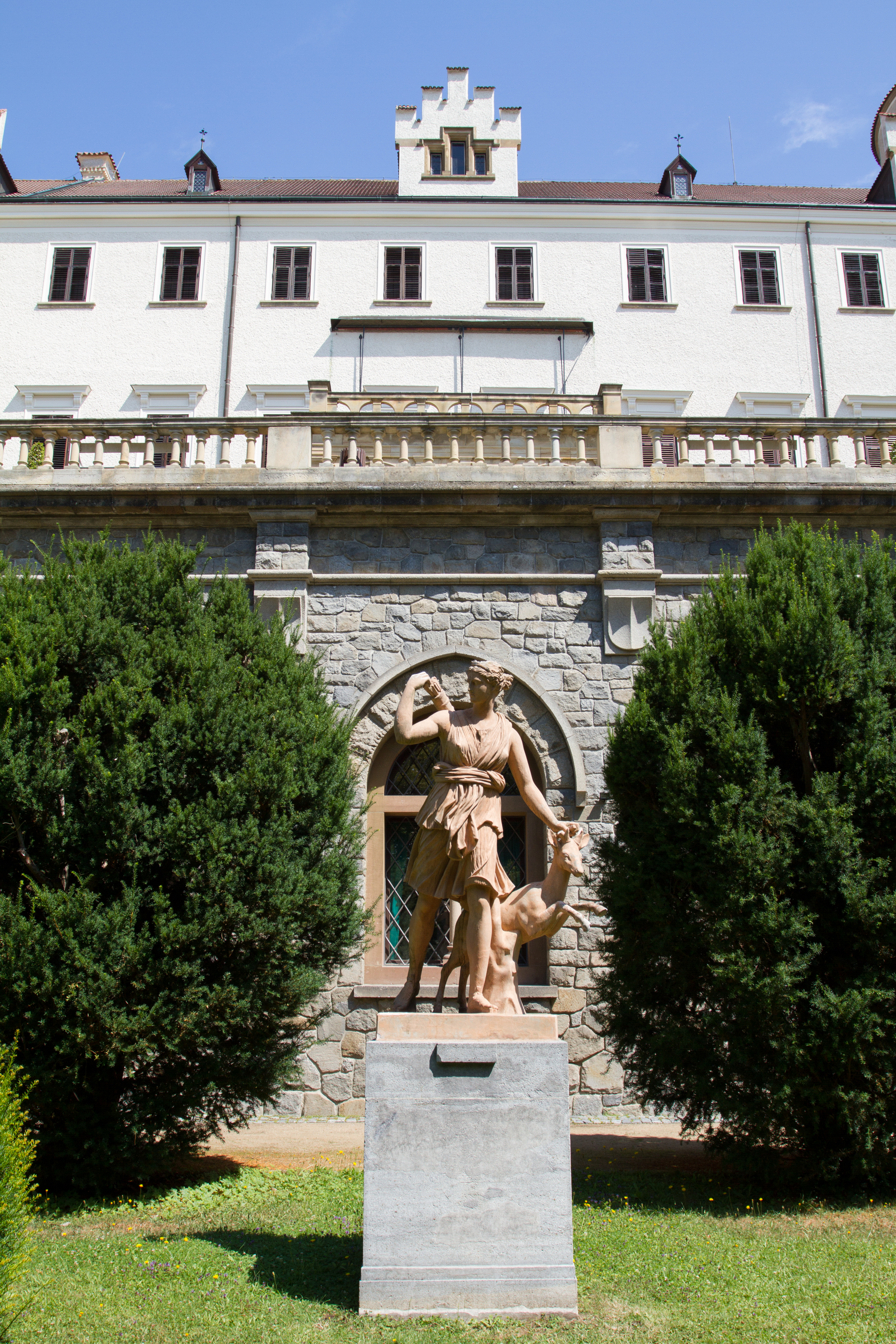 Zámek Konopiště, Benešov 1, Benešov.